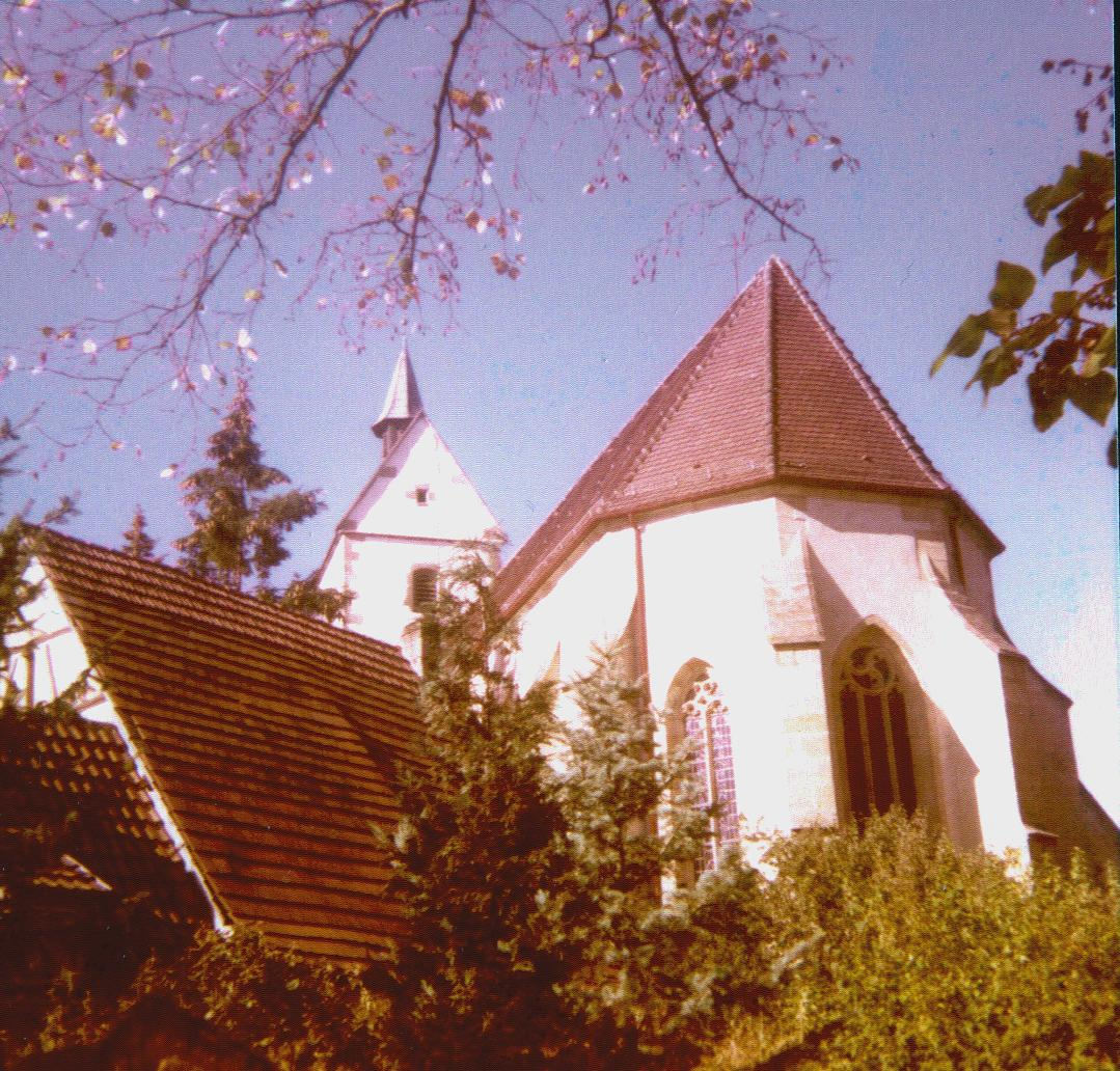 Evangelische Peter-und-Pauls-Kirche zu Mössingen